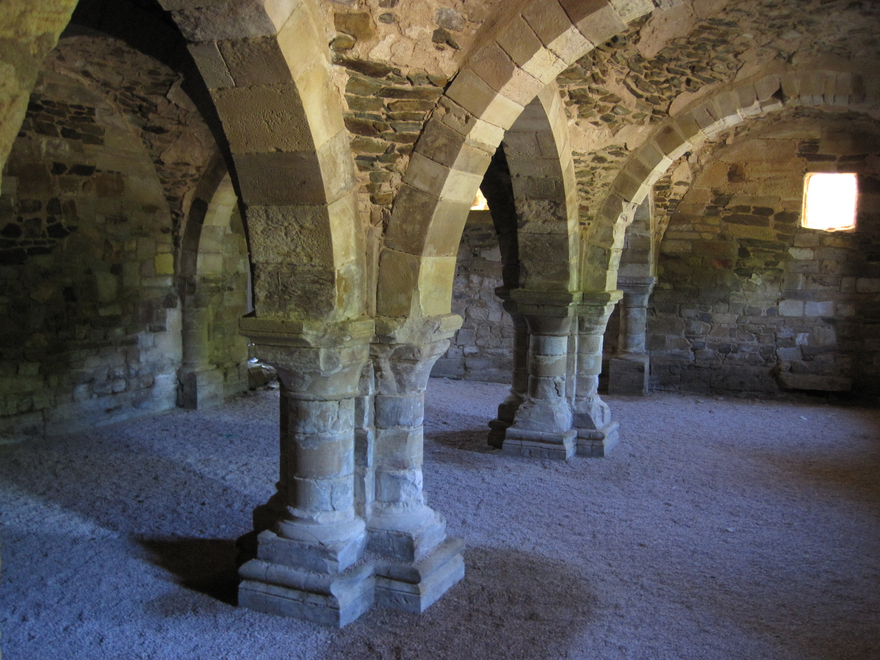 La llamada Sala de los Monjes en el Monasterio de Moreruela (Zamora, España).